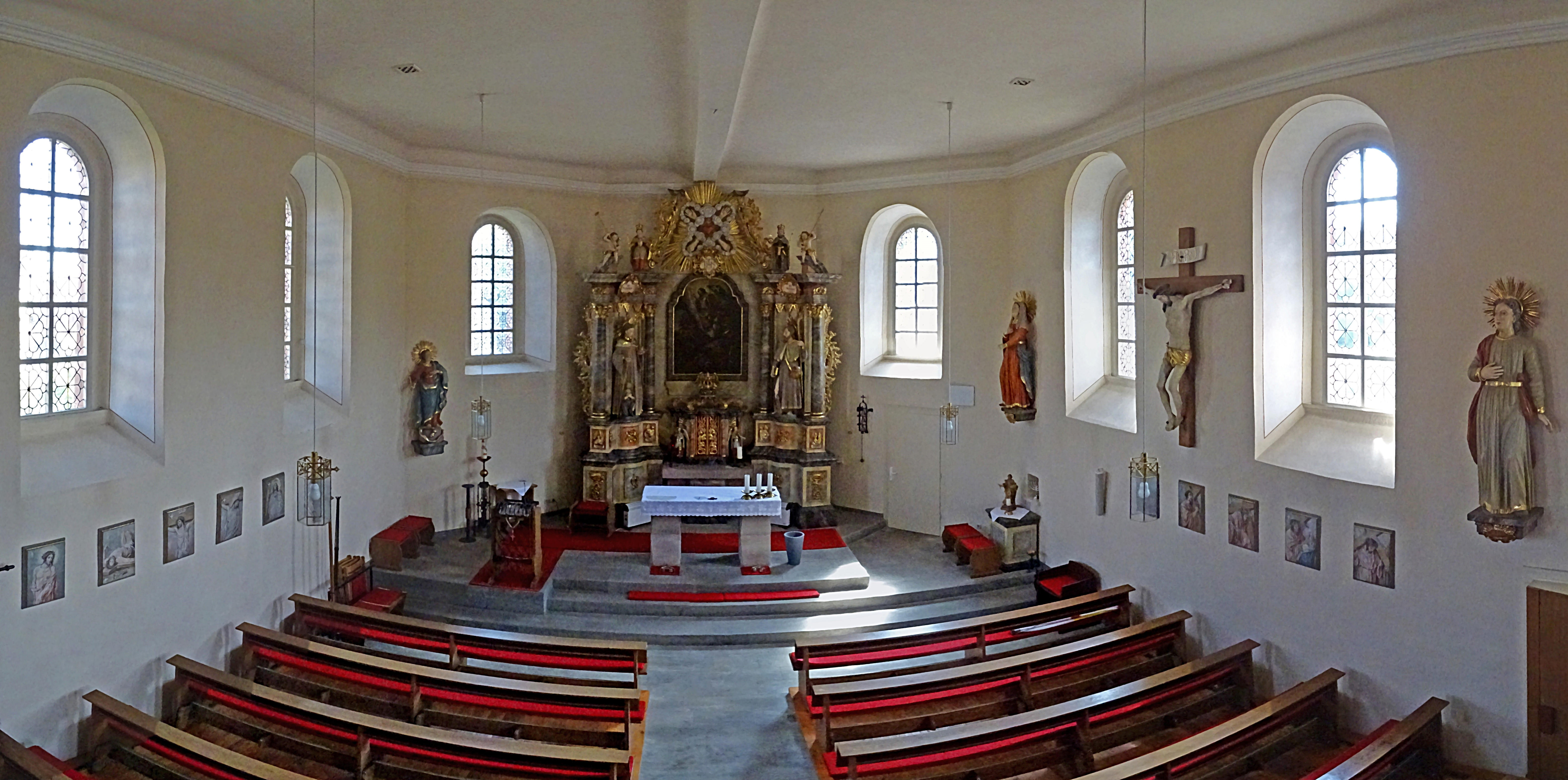 Innenraum Panorama der Dorfkirche St. Leonhard (Birkenfelde)